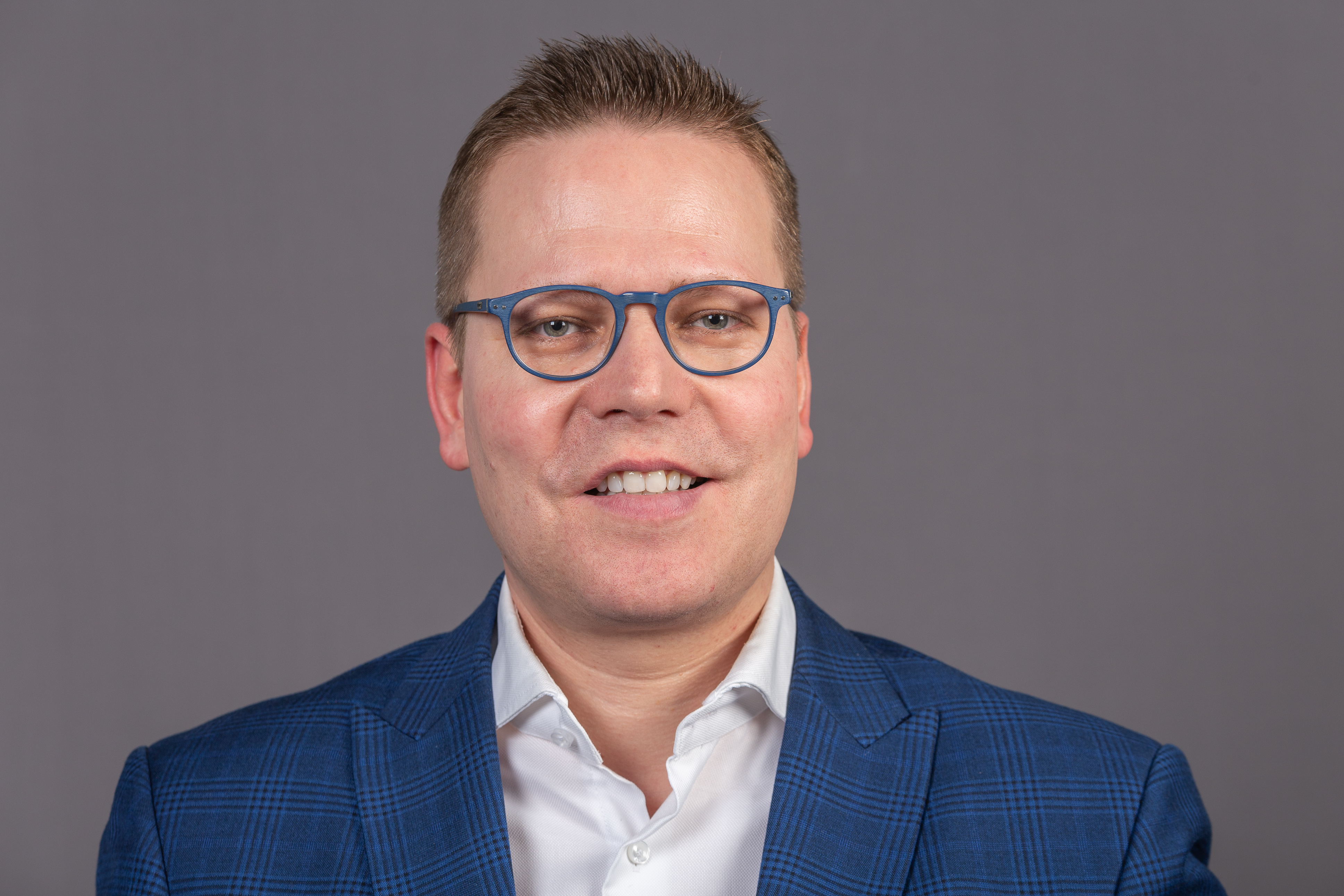 Deutscher Bundestag; Tino Sorge, CDU